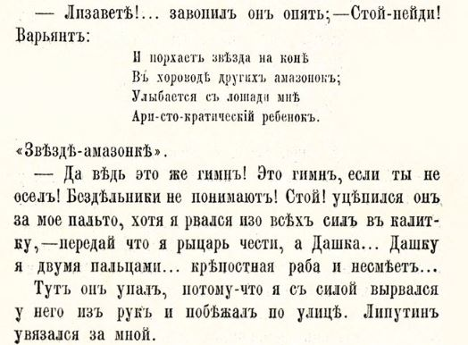 Страница первого отдельного издания романа Бесы, стихи Игната Лебёдкина